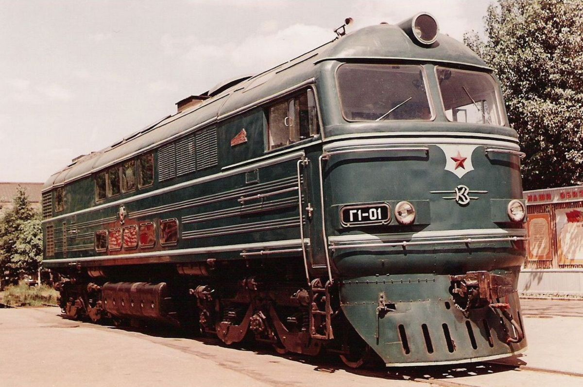 Газотурбовоз Г1-01/ Фото из архива Коломенского тепловозостроительного завода.